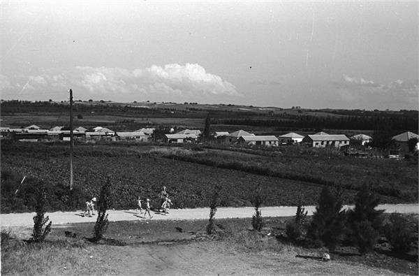 גן חפר - מראה